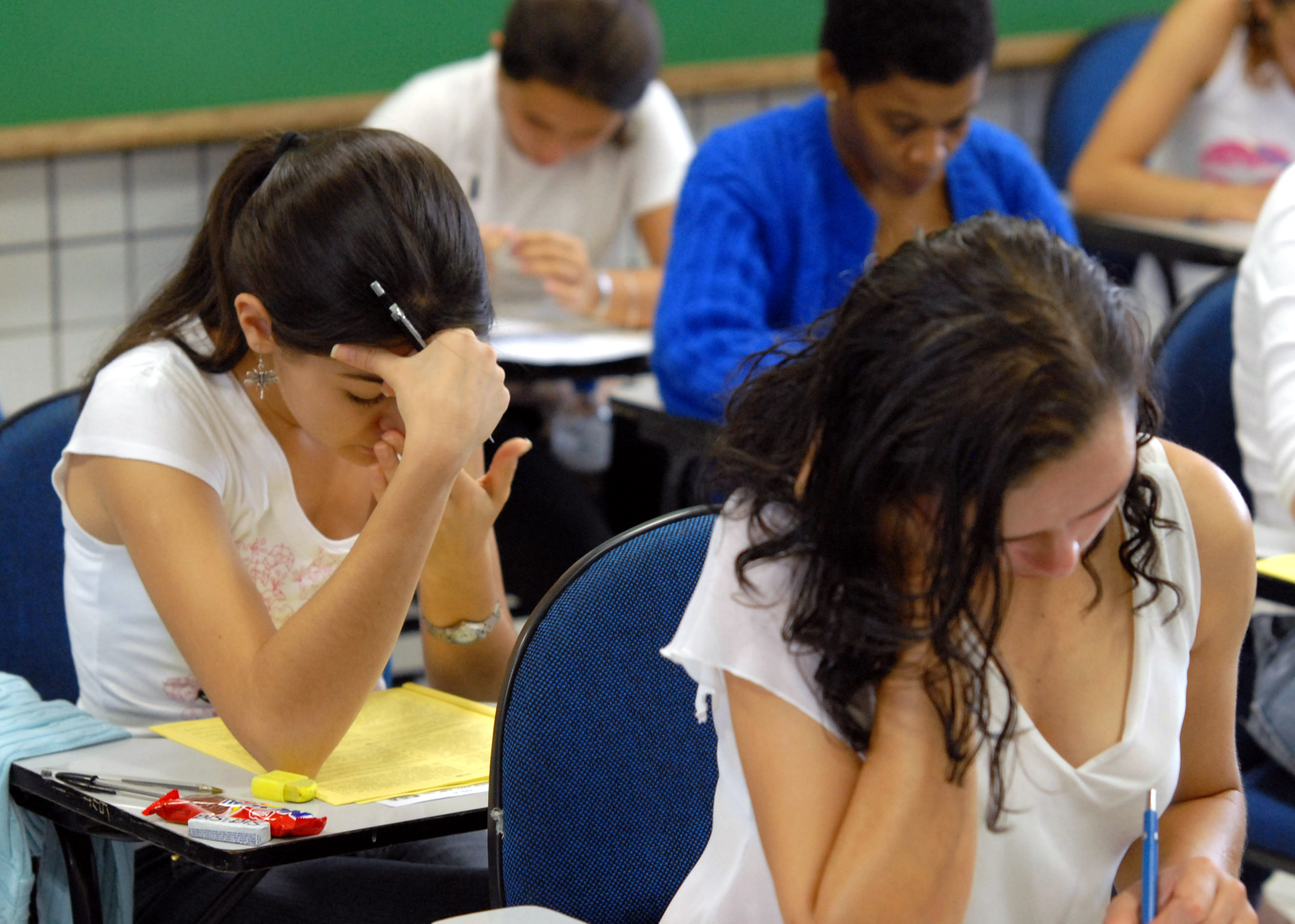 Brasília - Participantes do Exame Nacional do Ensino Médio (Enem). Além de alunos, prova também é realizada por pessoas com interesse em ganhar pontos para o ProUni, programa de bolsas para universidades particulares